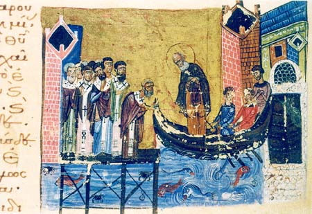 Gregory of Nazianzus in Constantinople. Григорий Богослов приезжает в Константинополь